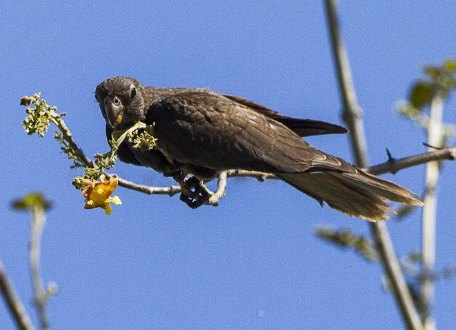 Black Parrot - Ankarafantsika - Madagascar_S4E9458